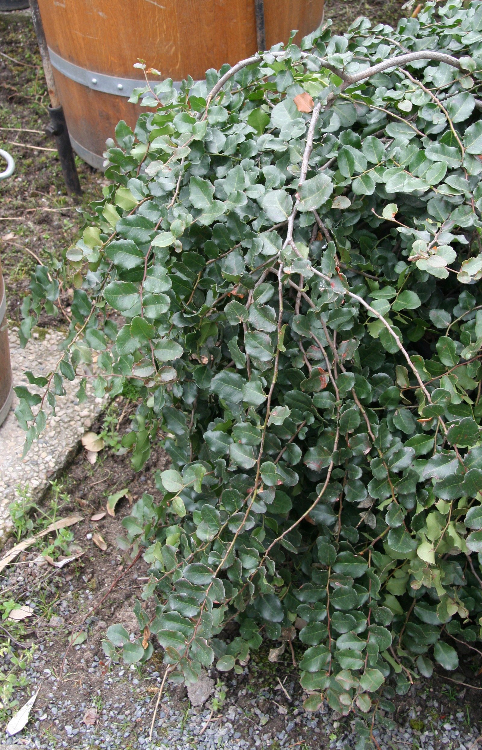 Nothofagus cunninghamii im Botanischen Garten Dresden